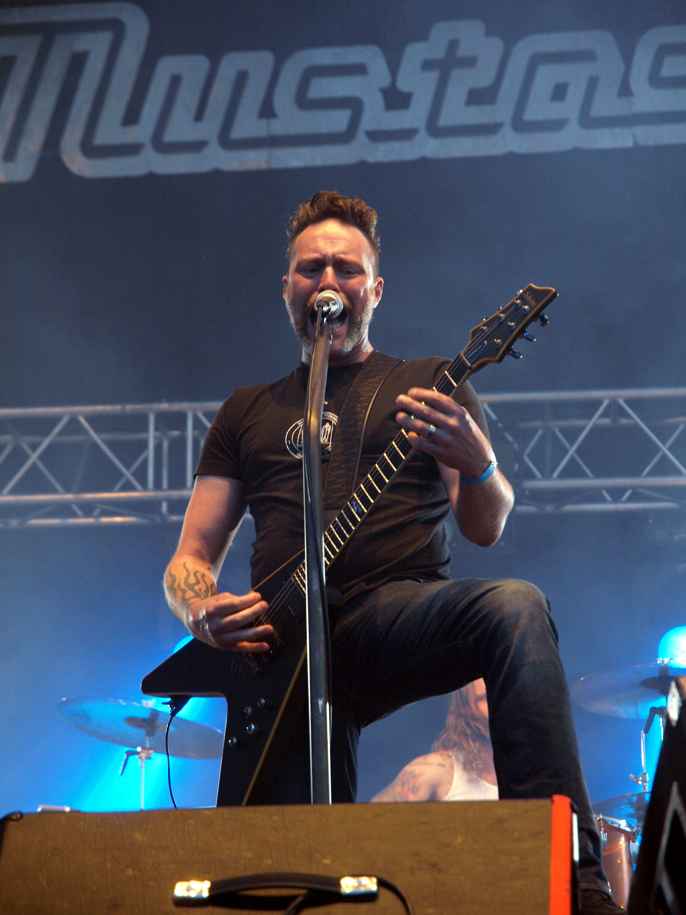 Mustasch live am Myötätuulirock 2011